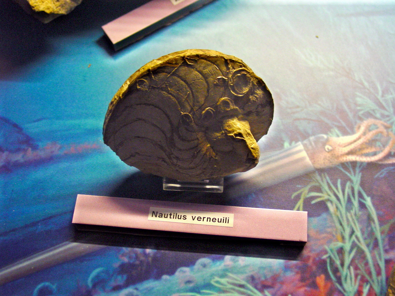 self made